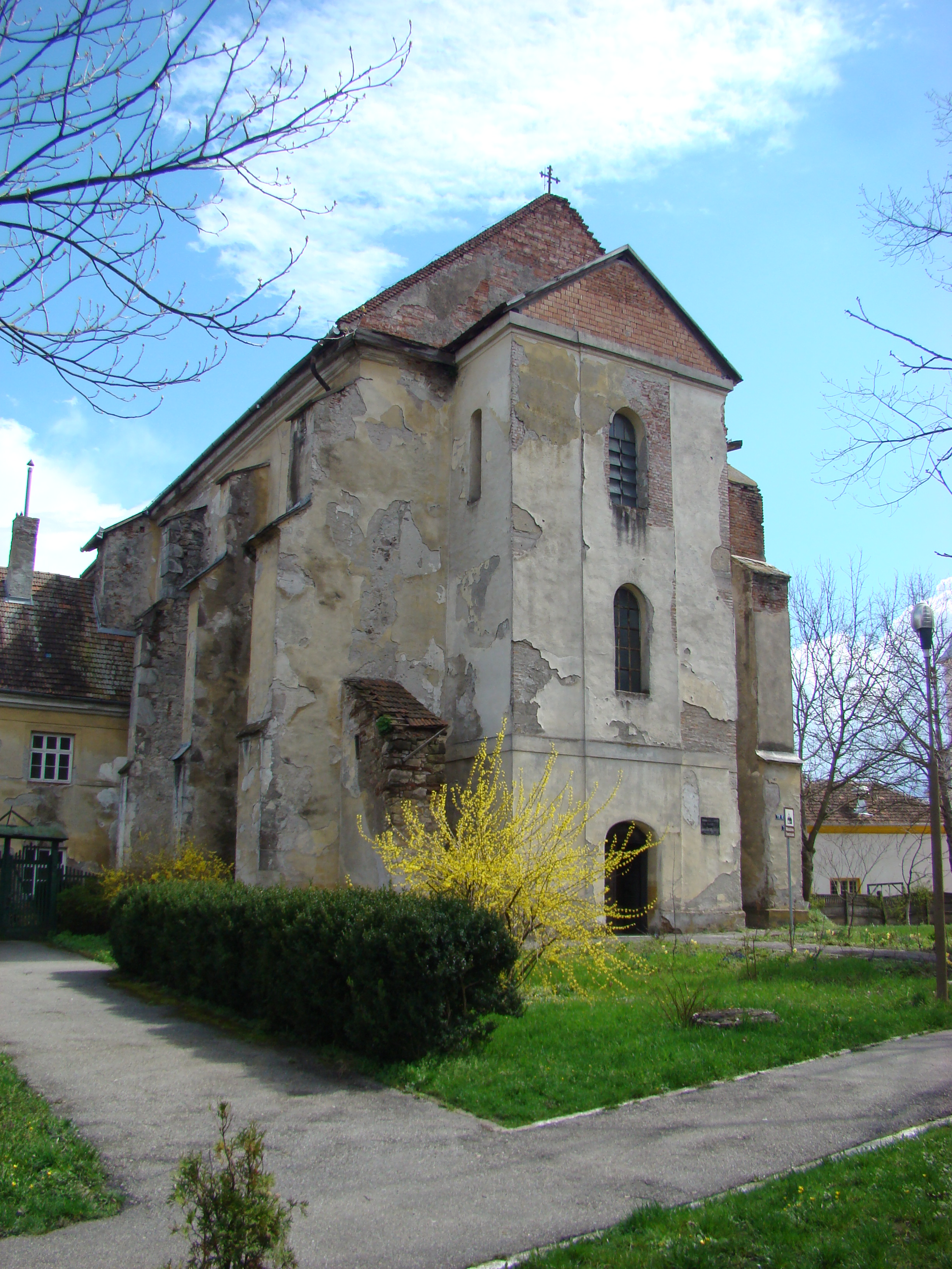 Mănăstirea franciscană, sat BAIA DE CRIŞ; comuna BAIA DE CRIŞ